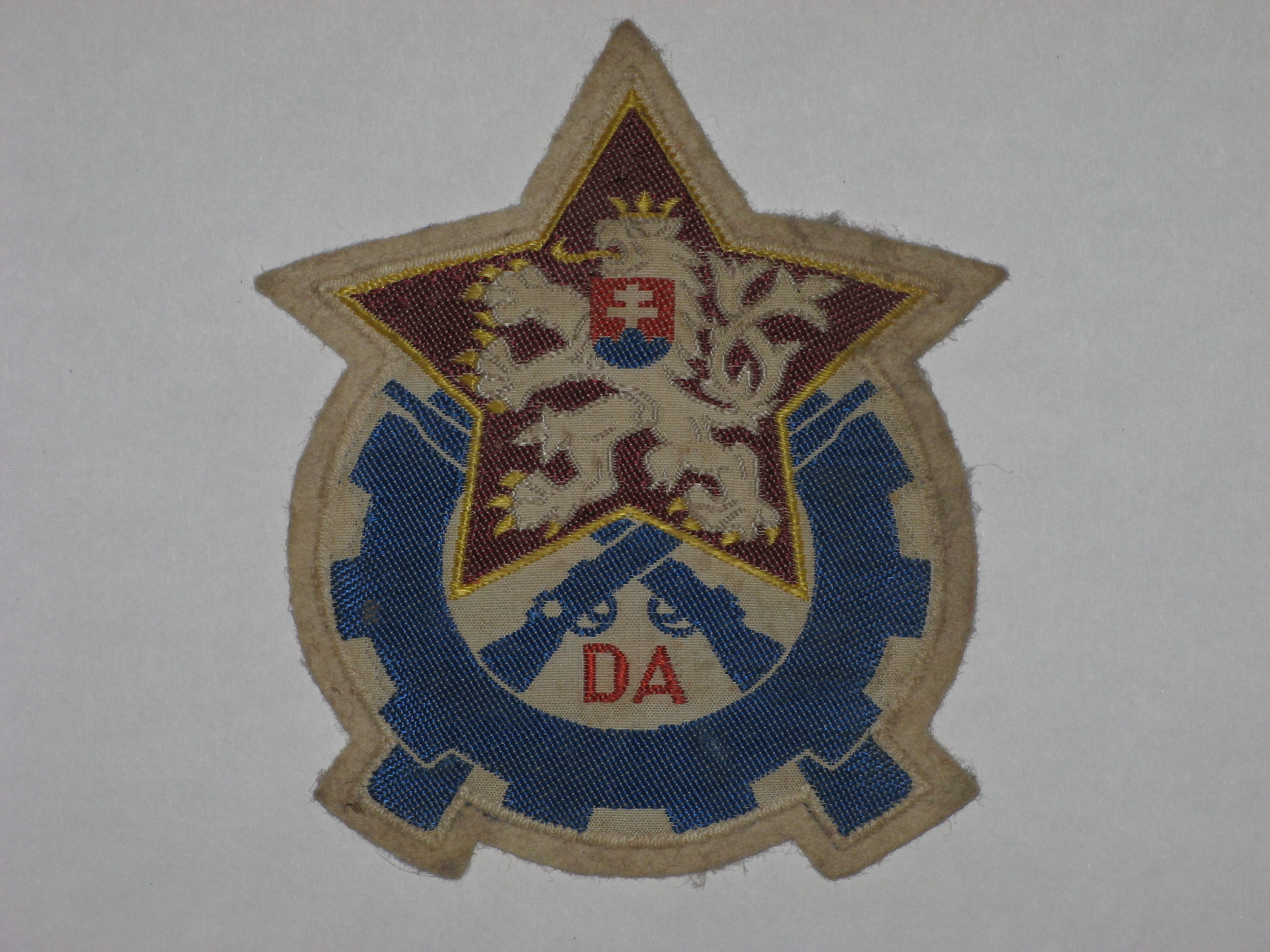 Dům armády. Nášivka. Dům armády byl v 50. letech předchůdce armádní sportovní organizace Dukla